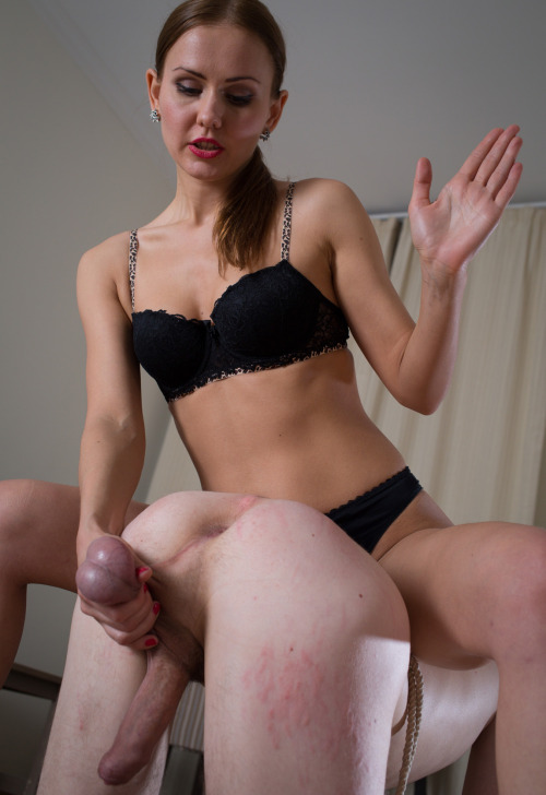 Đa phần là tra tấn tinh hoàn. Nam sẽ quỳ xuống, chổng mông lên và dạng hai chân ra, để lộ hai quả tinh hoàn. Bạn nữ có thể đánh, đá, hành hạ tinh hoàn tùy thích